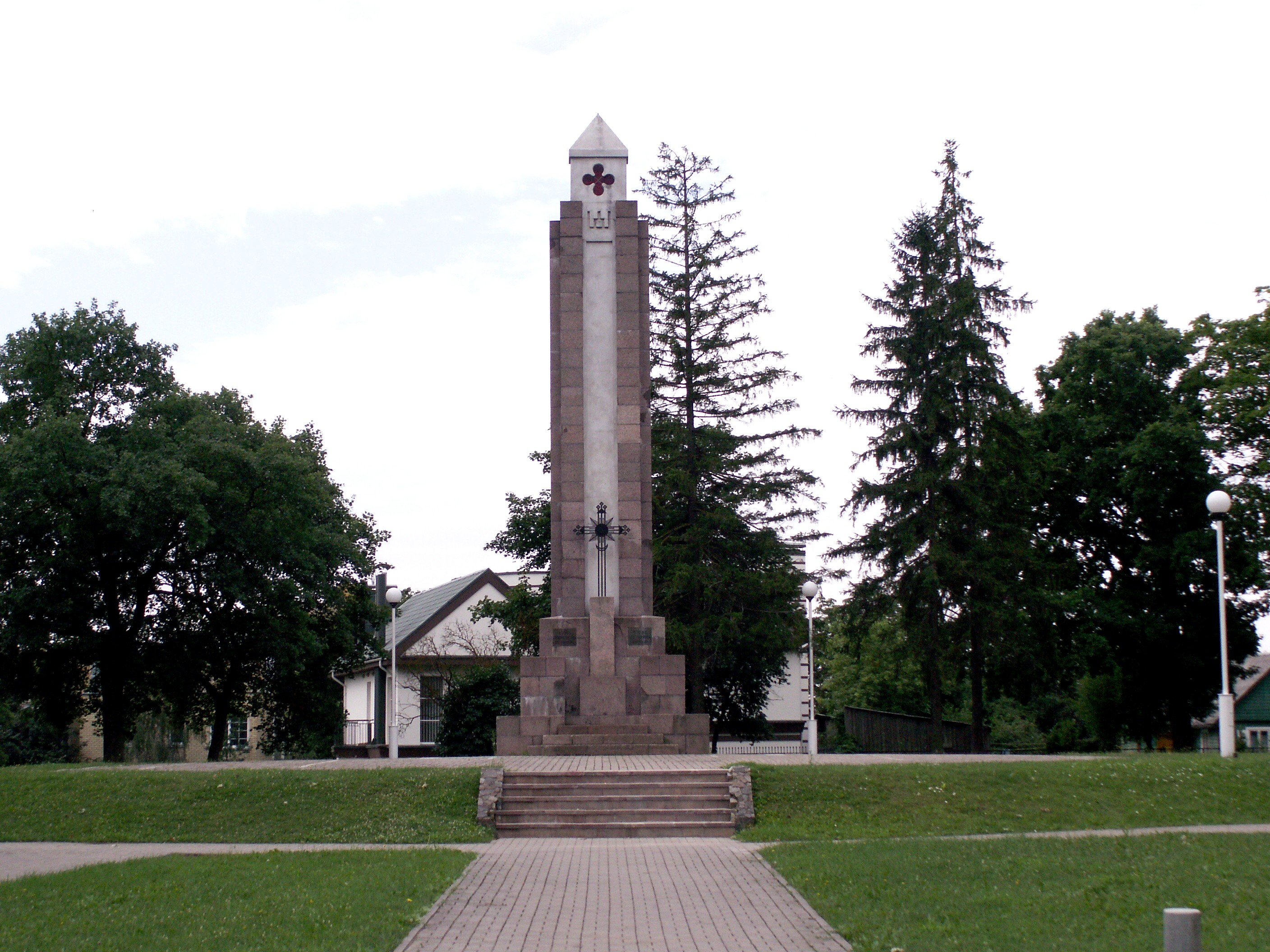 Kriegsgräberstätte Sukilėlių kalnelis, Šiauliai